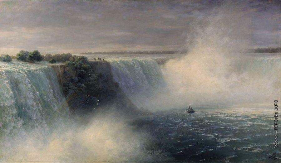 Ниагарский водопад Год создания 1892 Собрание Национальный художественный музей Республики Беларусь